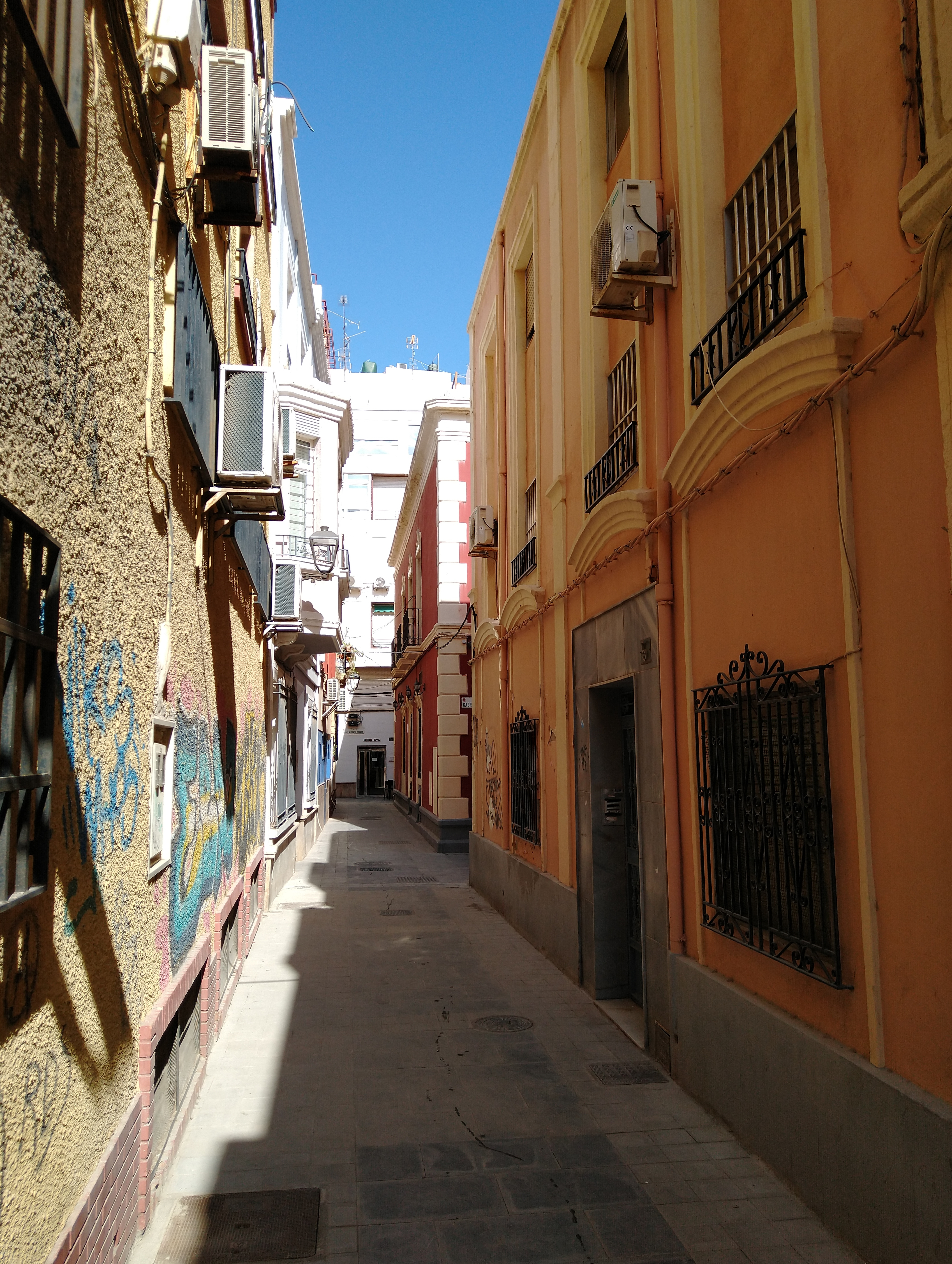 Casa natal del maestro José Padilla Sánchez en Almería (España).